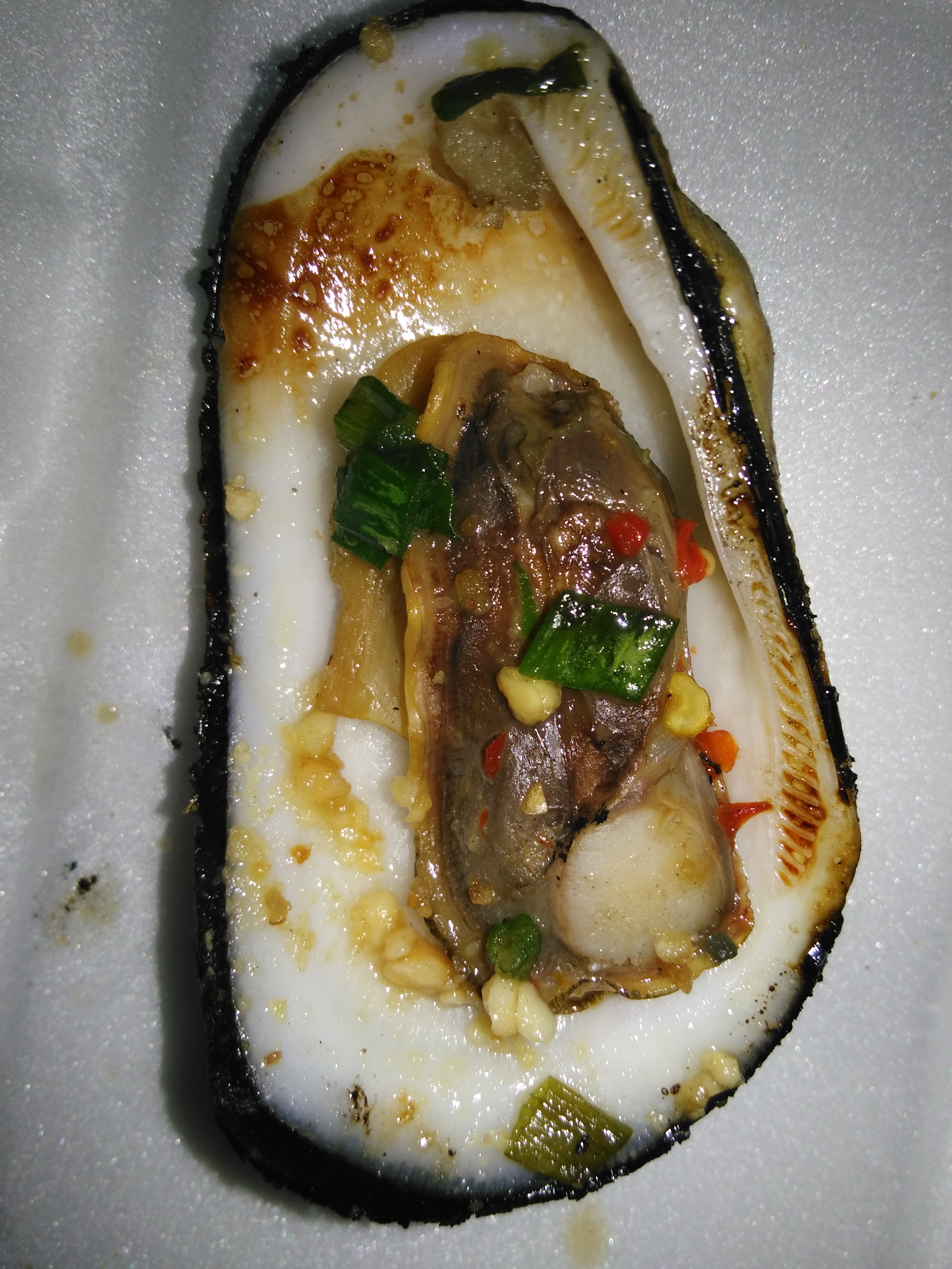 Hình tự chụp bằng điện thoại cá nhân về một con sò quéo nướng mỡ hành rồi tải lên wiki